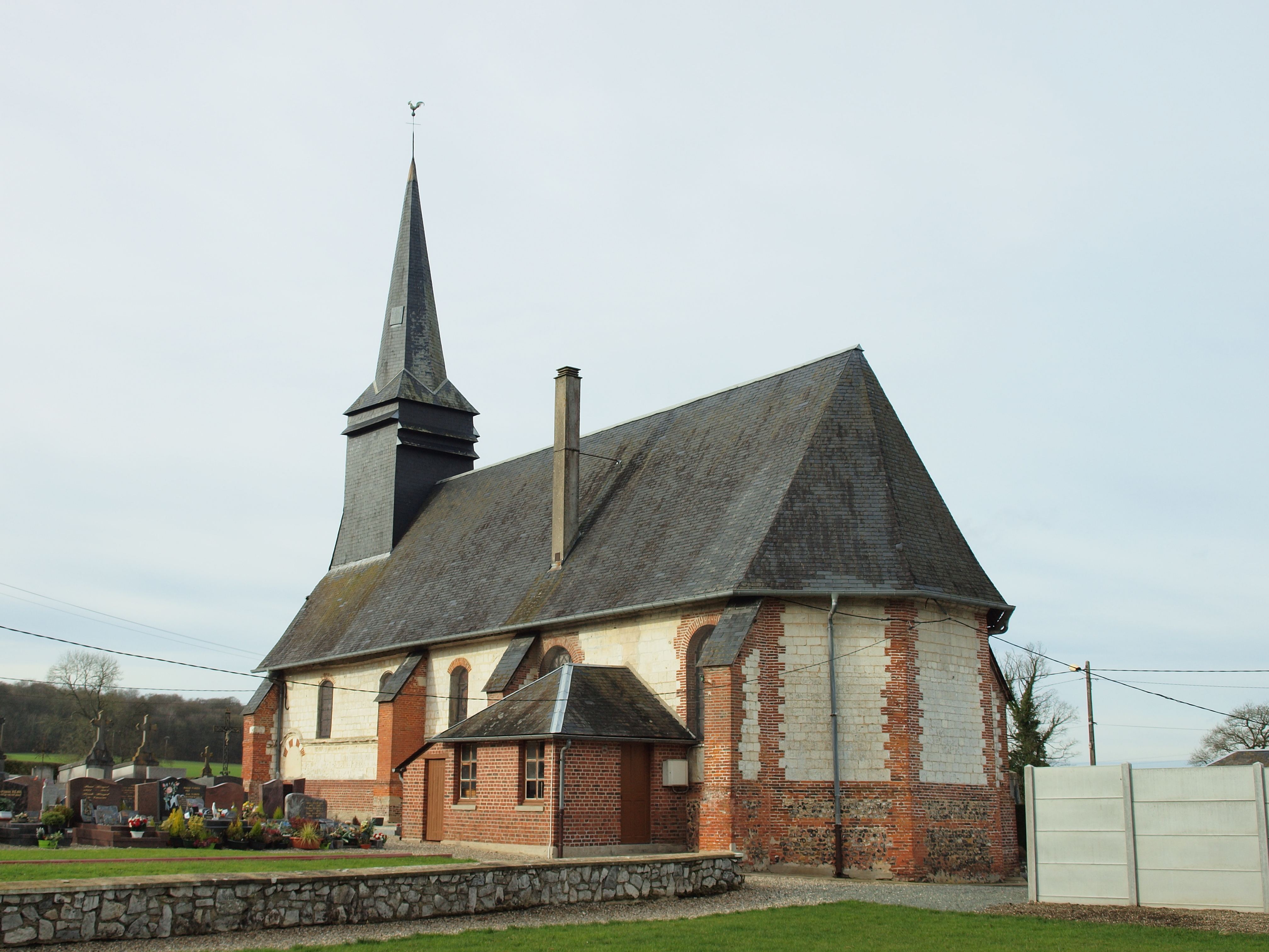 Quincampoix-Fleuzy (Oise, France)